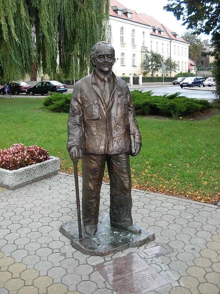 Pomnik Andrzeja Szwalbego